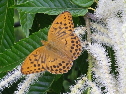 Damora sagana(メスグロヒョウモン), Male(オス), Nagasaki(長崎市)